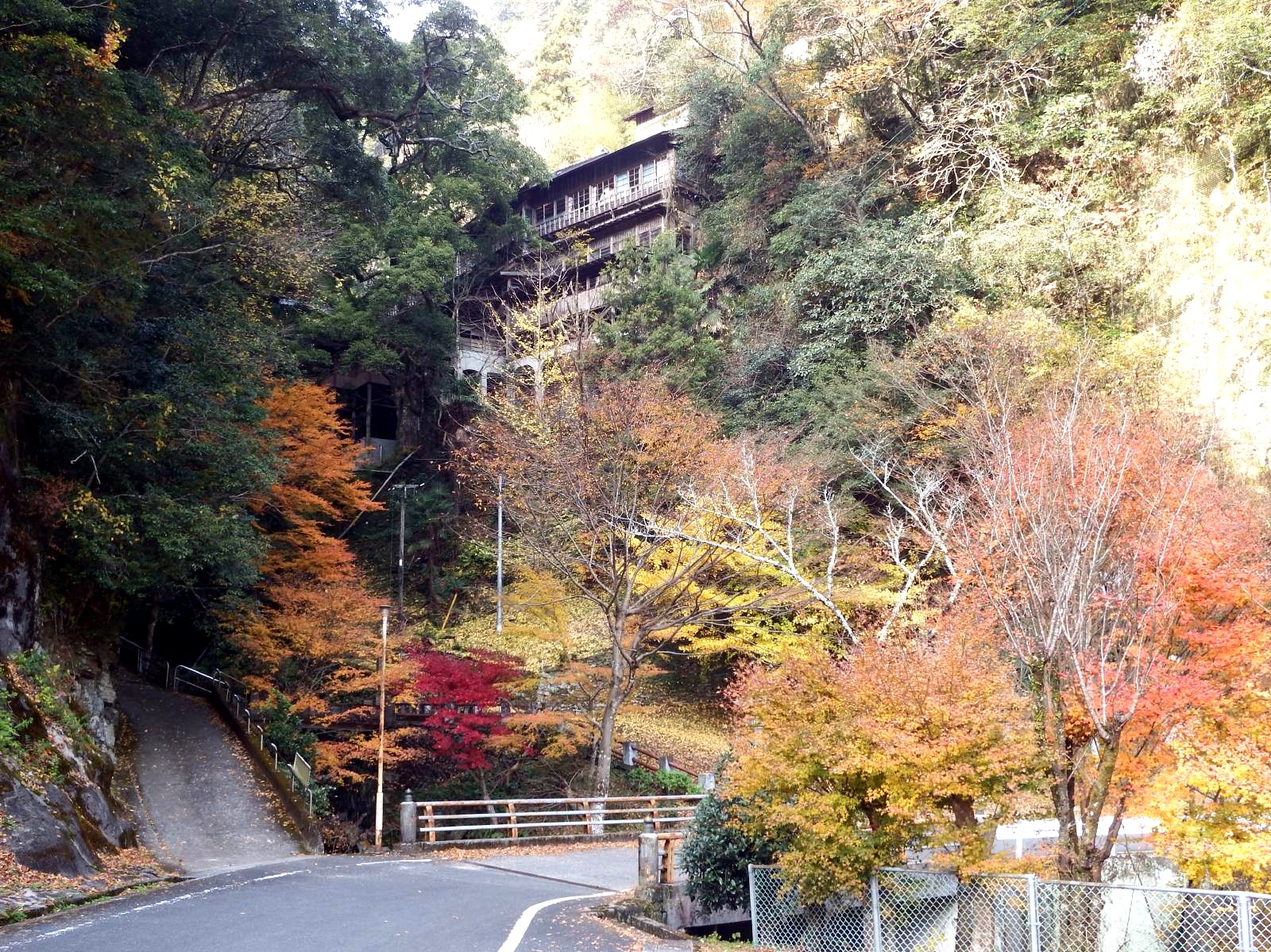 仙龍寺の入口付近